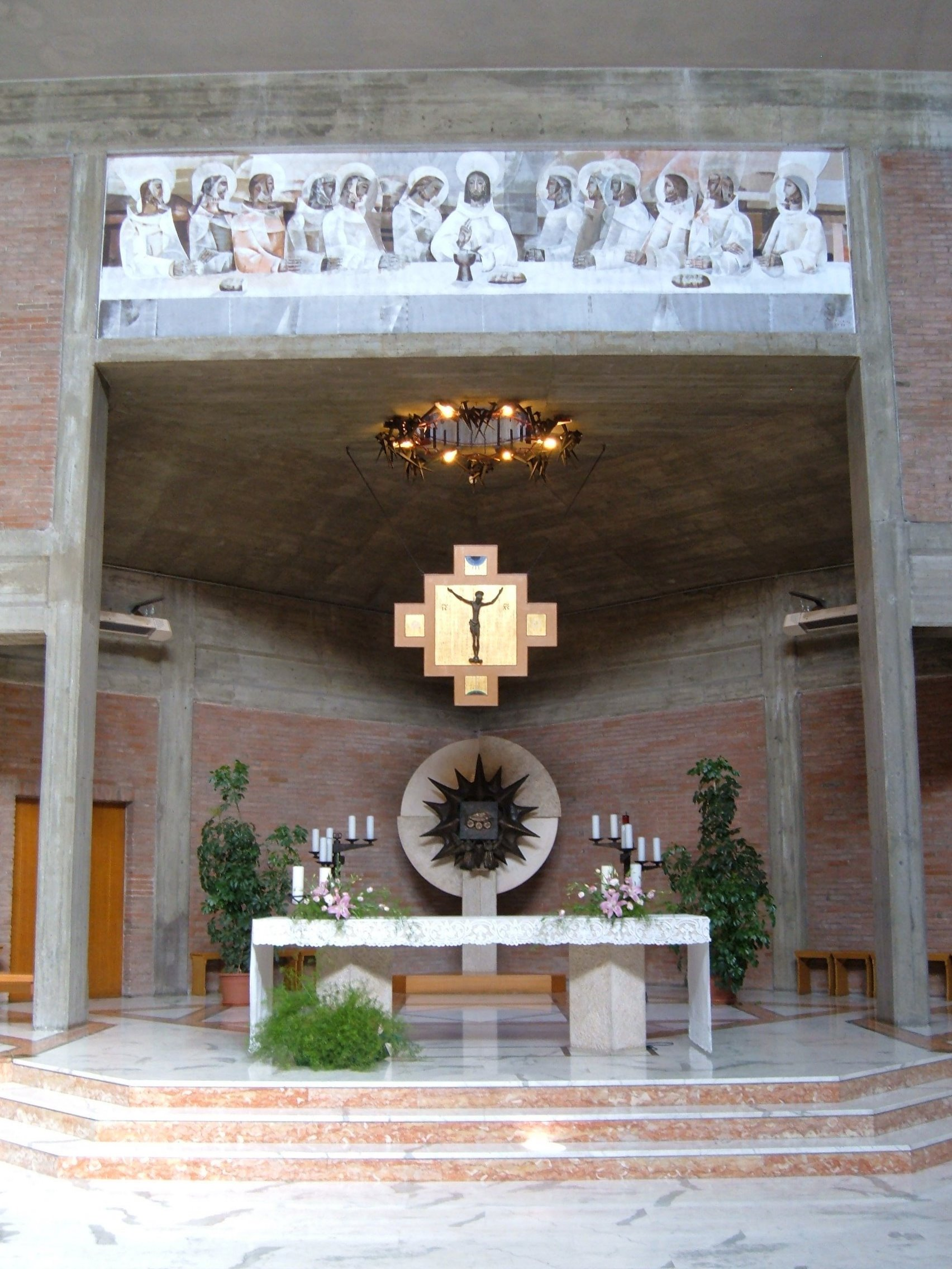 Chiesa di San Damaso I papa, a Roma, nel quartiere Gianicolense.